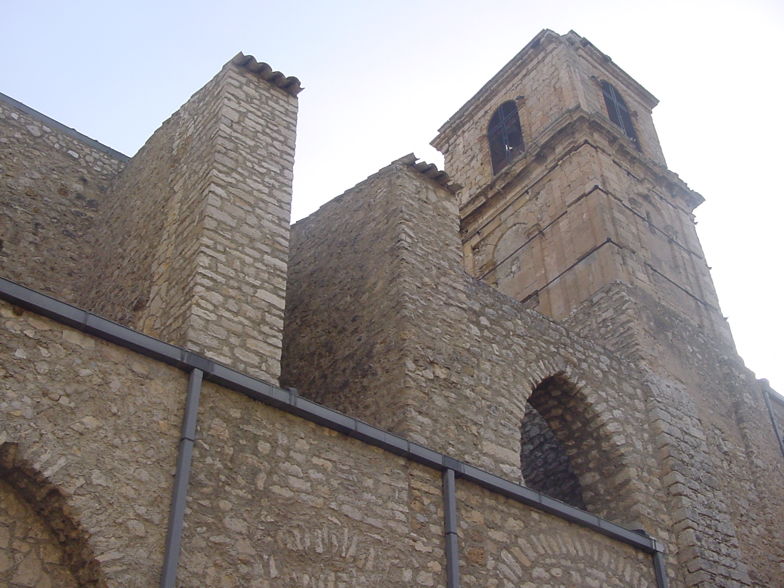 Chiesa Madre